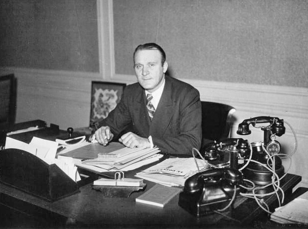 Portrait de M. Léo Lagrange, ministre des Loisirs : photographie de presse